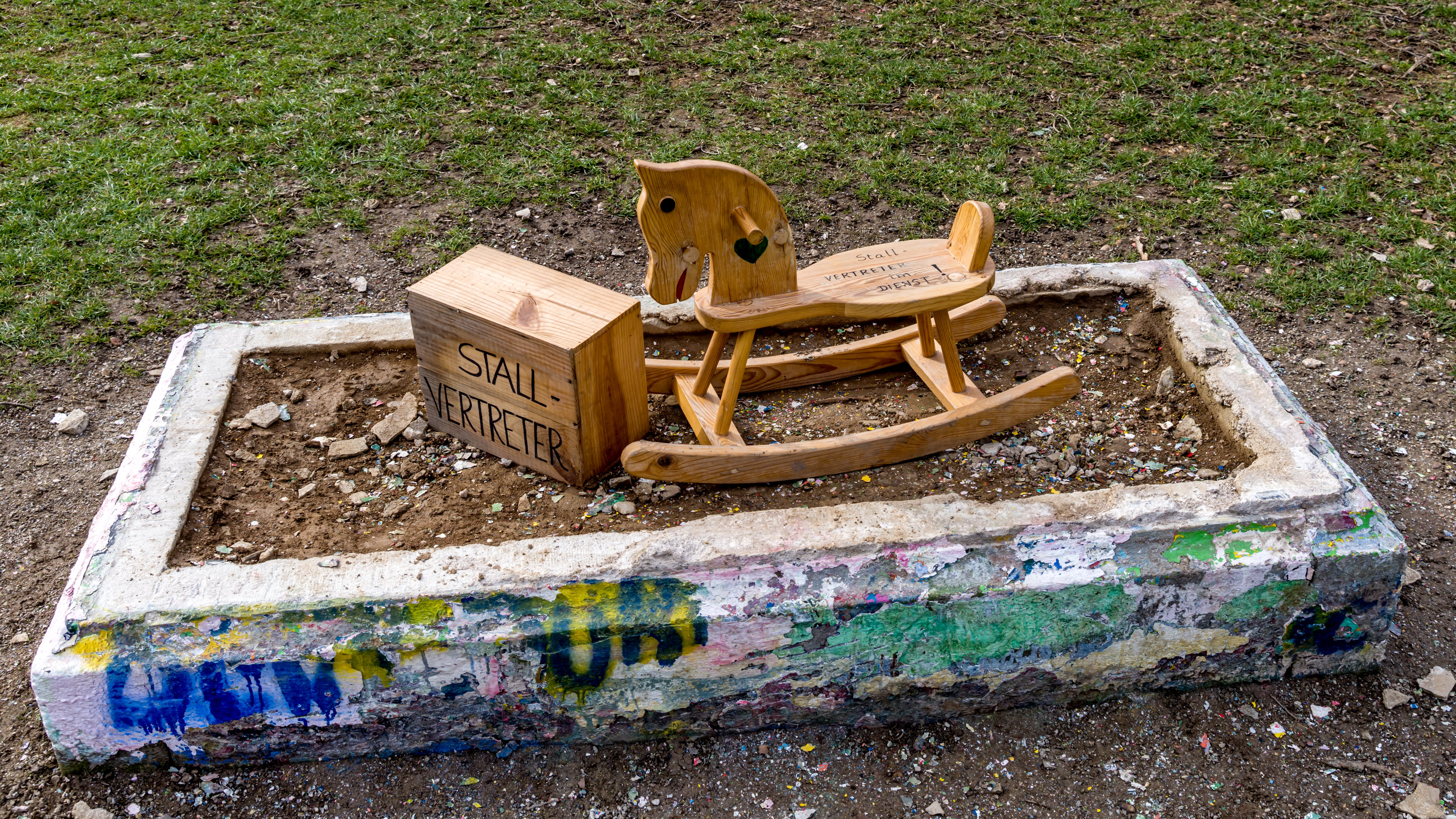 Der Stallvertreter des Holbeinpferdles